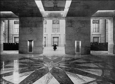 Vestíbulo hacia la calle San Martín de la casa central del Banco de la Provincia de Buenos Aires. Calles San Martín y Bartolomé Mitre.